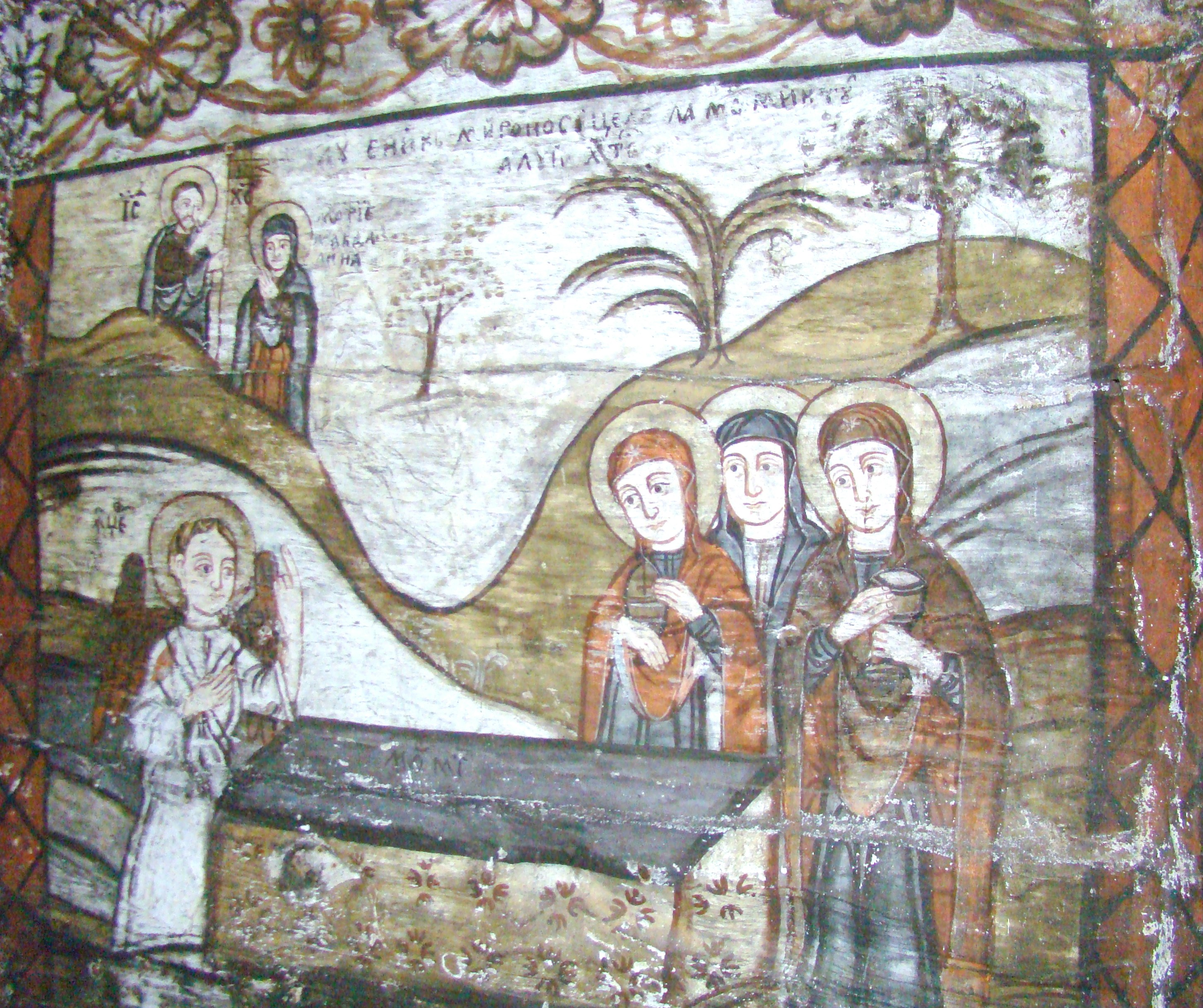 Biserica de lemn „Nașterea Maicii Domnului” din Călinești-Căeni, județul Maramureș